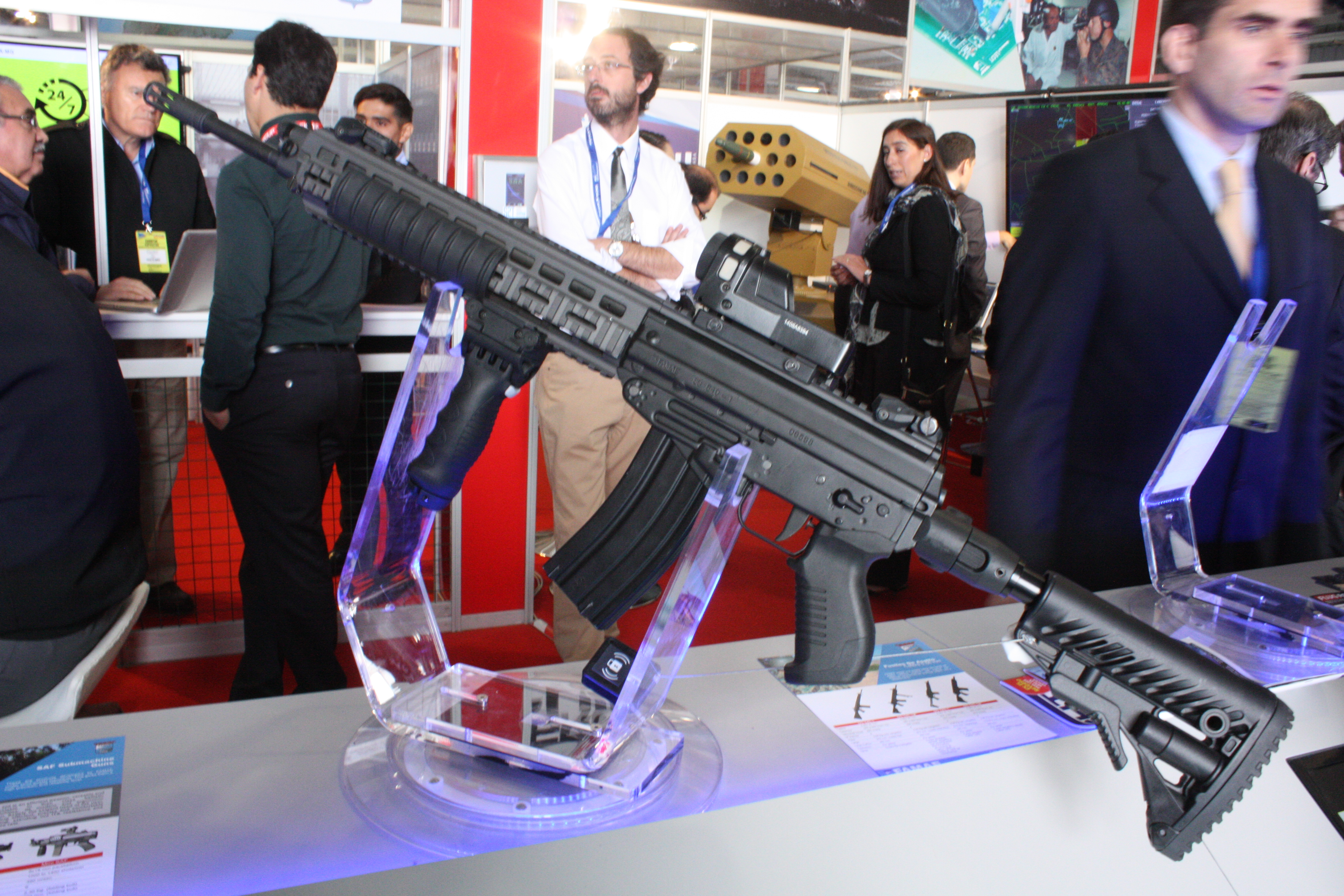 SG-540-1M Famae Ejercito de Chile presentado en Fidae 2016